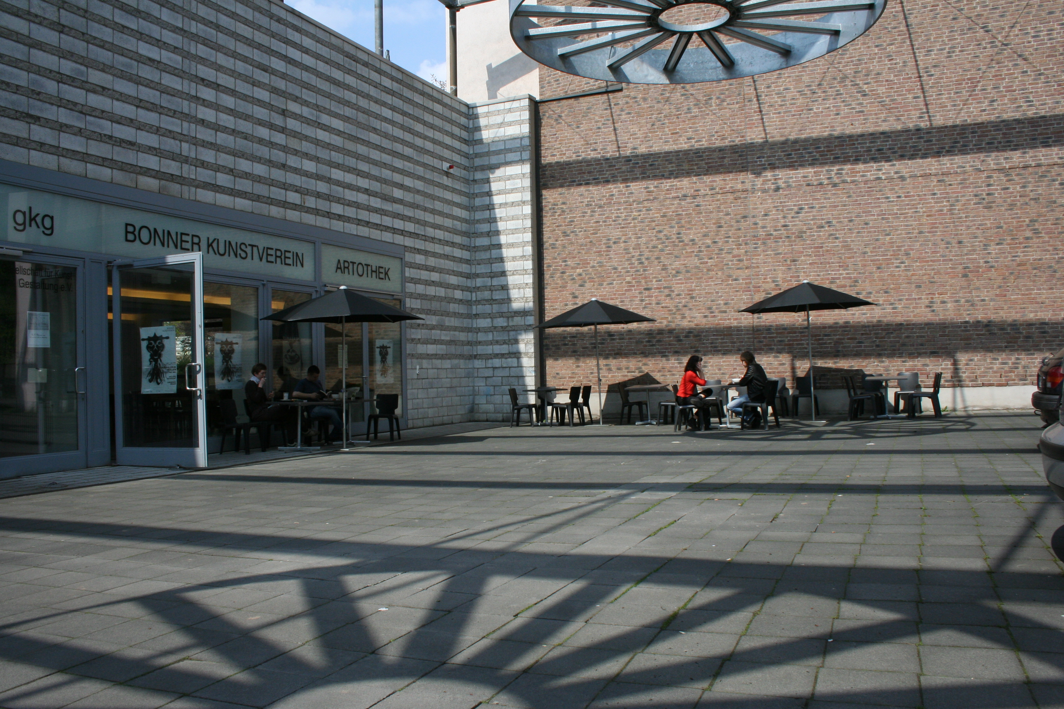 Bonner Kunstverein, Hochstadenring 22, Bonn-Nordstadt: Außenansicht